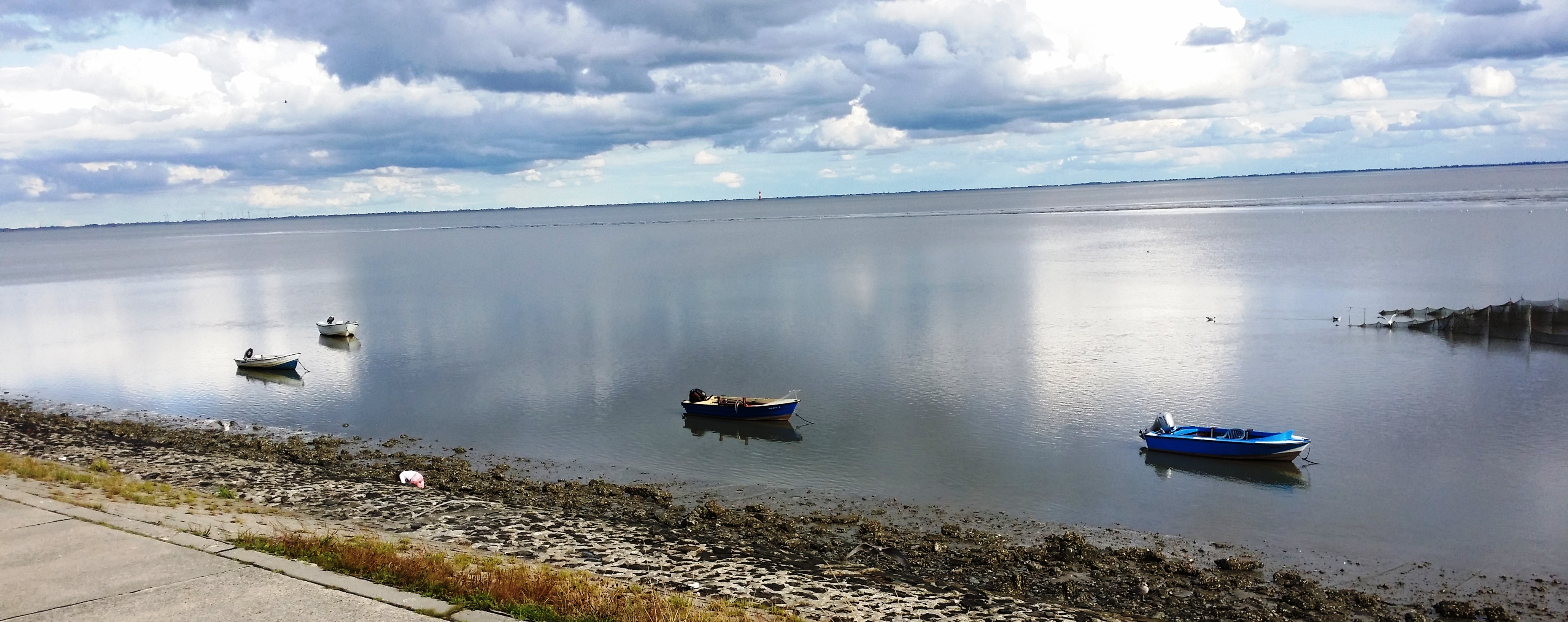 Fischerboote